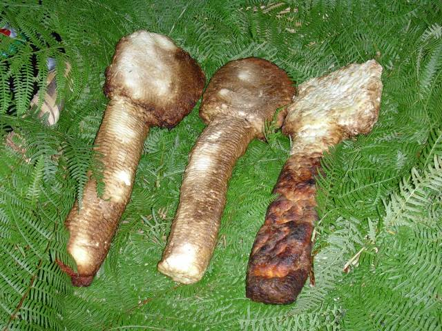 Autore: Gino Larosa OTRS: 2008021510007787